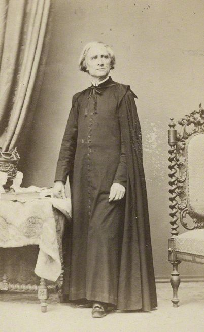 Portrait of Franz Liszt